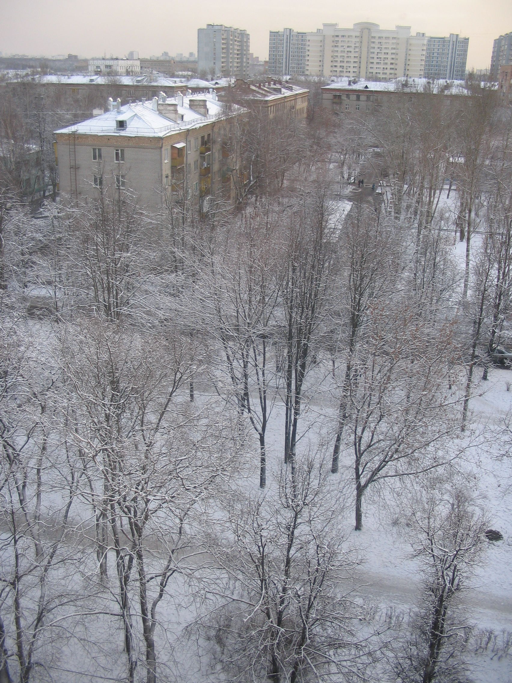 Измайловский бульвар (на переднем плане) и Средняя Первомайская улица (на среднем плане) зимой. На заднем плане видны высотные дома новой застройки на Первомайской улице.